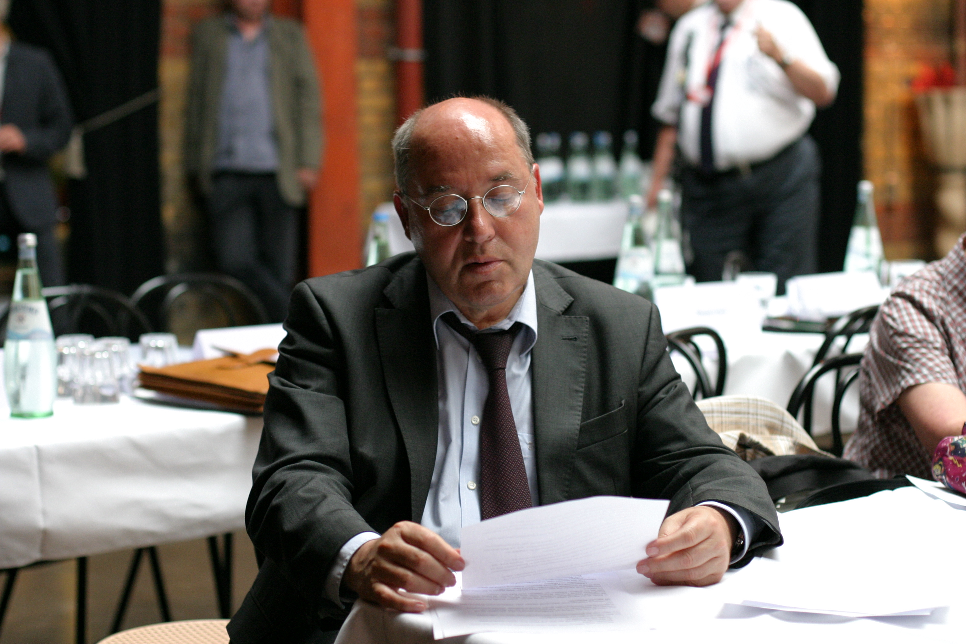 Gregor Gysi vor seiner Rede